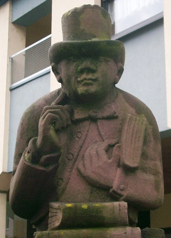 Konzer Doktor